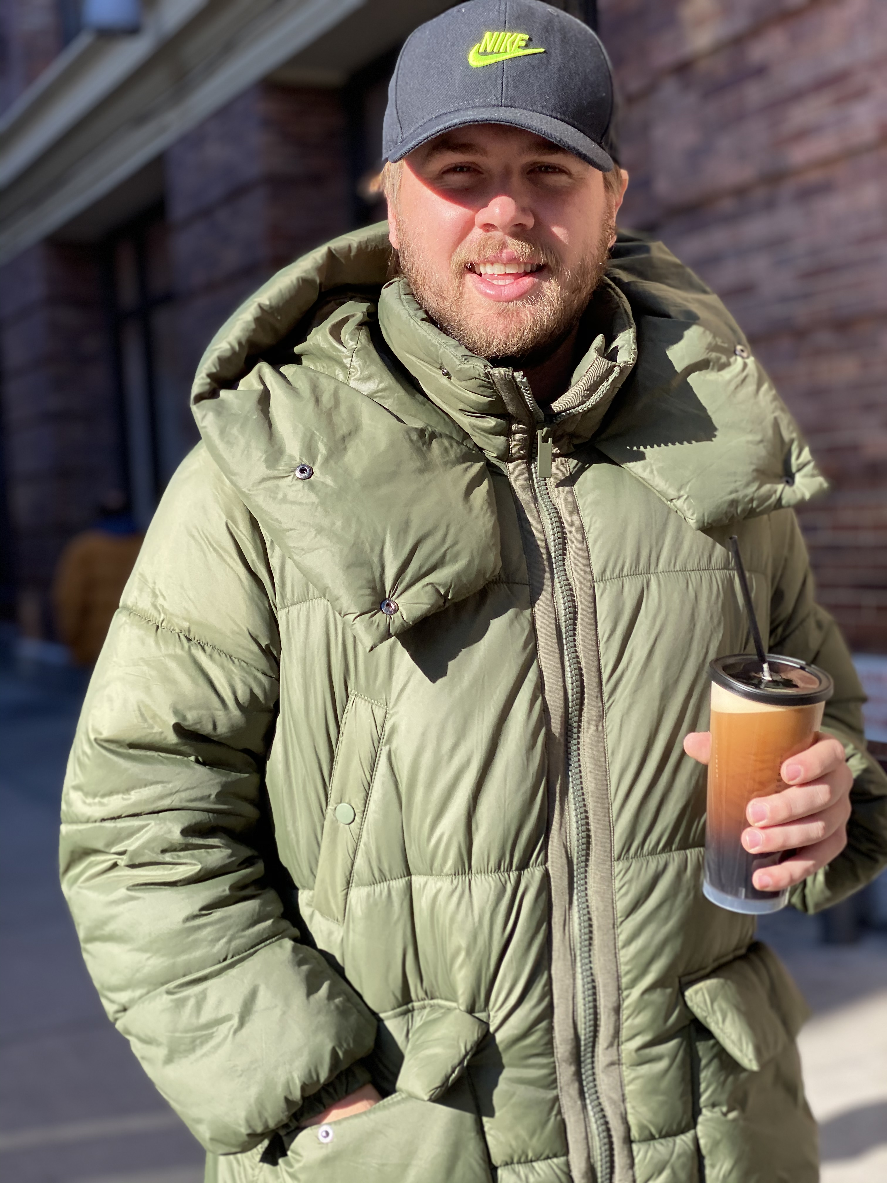 Noah Assad en New York